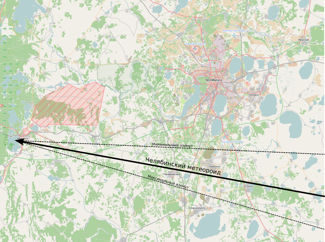 Траектория метеорита, упавшего в озеро Чебаркуль. Источник: Zuluaga, J.I. and Ferrin, I. "A preliminary reconstruction of the orbit of the Chelyabinsk Meteoroid.", ArXiv e-prints, arxiv:1302.5377 February 2013.